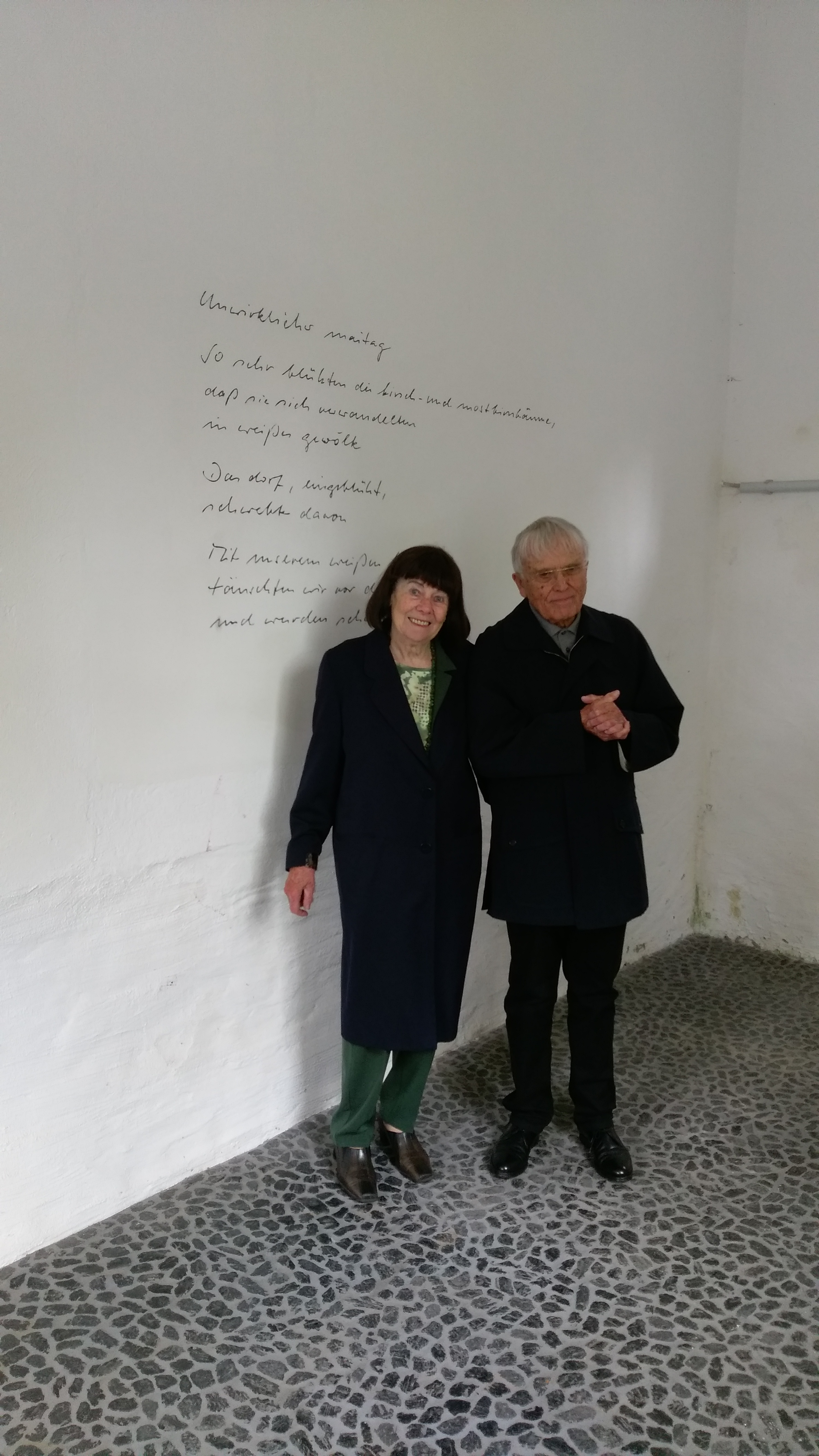 Elisabeth und Reiner Kunze besuchen im Mai 2017 die Raumarbeit "Poesie der Energie" des Künstlers Frank Maibier in Oelsnitz/Erzgeb. in dem Maibier historisch-wirtschaftliche Inhalte (des ehemaligen "Lugau-Oelsnitzer Steinkohlenreviers") mit dem Text "Unwirklicher Maitag" Reiner Kunzes verbindet.